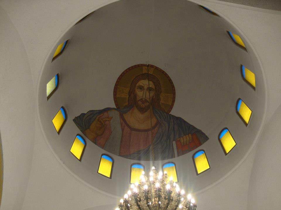 cristo cupula